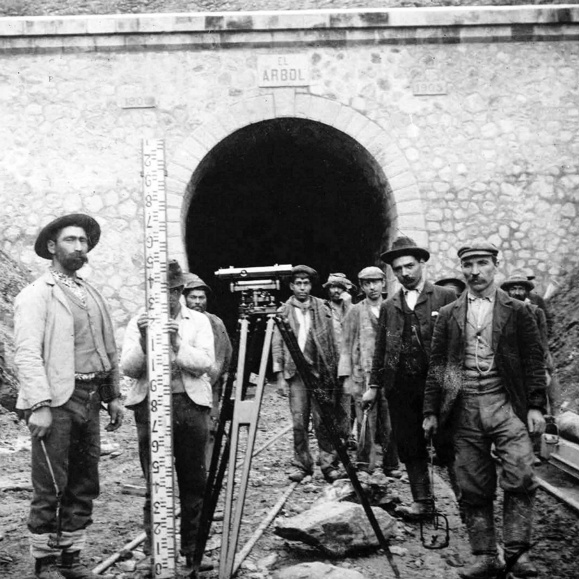 Túnel ferroviario El Árbol en construcción, ubicado entre las ciudades de San Fernando y Pichilemu, año 1905.